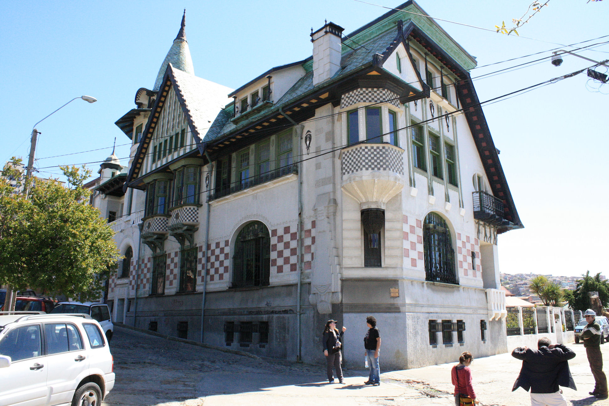 Valparaiso